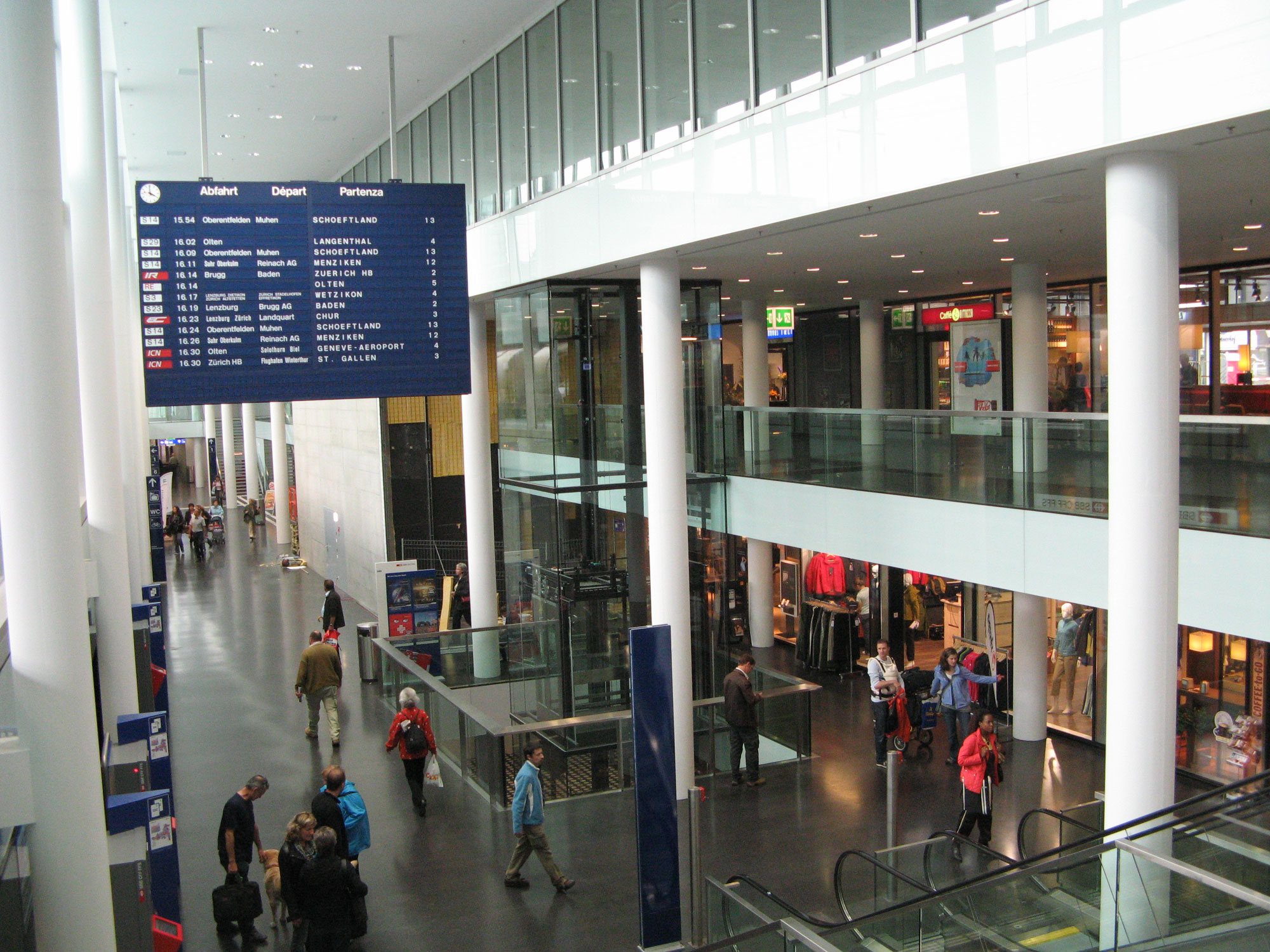 Im Innern des neuen Bahnhofs Aarau